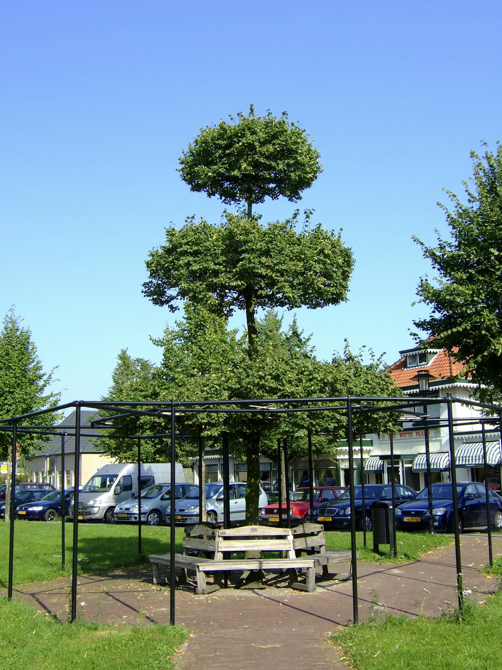 Toren: Overzicht op een etagelinde t.g.v. het 1200 jarig bestaan (opmerking: Publicatie: TRAP Zelhem (Cultuurhistorische Routes in Nederland - 56))